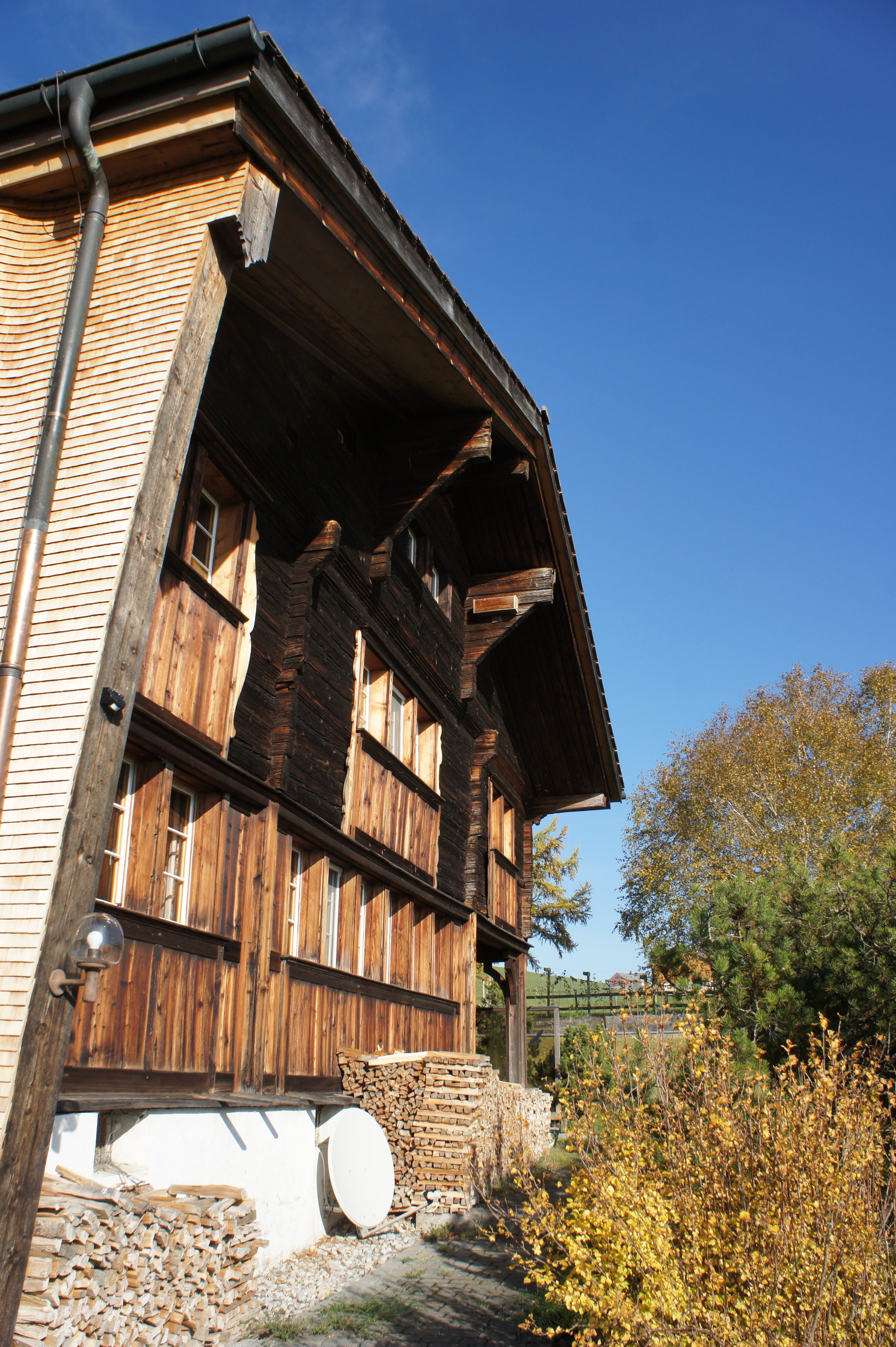 Eine Nahaufnahme der Süd-Fassade des Bauernhauses der Familie Kunz (mundartl. Kuenzes) an der Lehnstrasse oberhalb (und nördlich) von Appenzell. Das Kellergeschoss ist gemauert, der obere Teil ein gestrickter Holzbau. Die Westseite (links) ist mit Holz-Schindeln verkleidet.